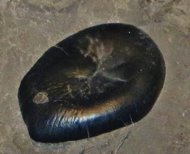 Fossil of Psephoderma, an extinct reptile- Took the picture at Museo di Scienze Naturali, Bergamo